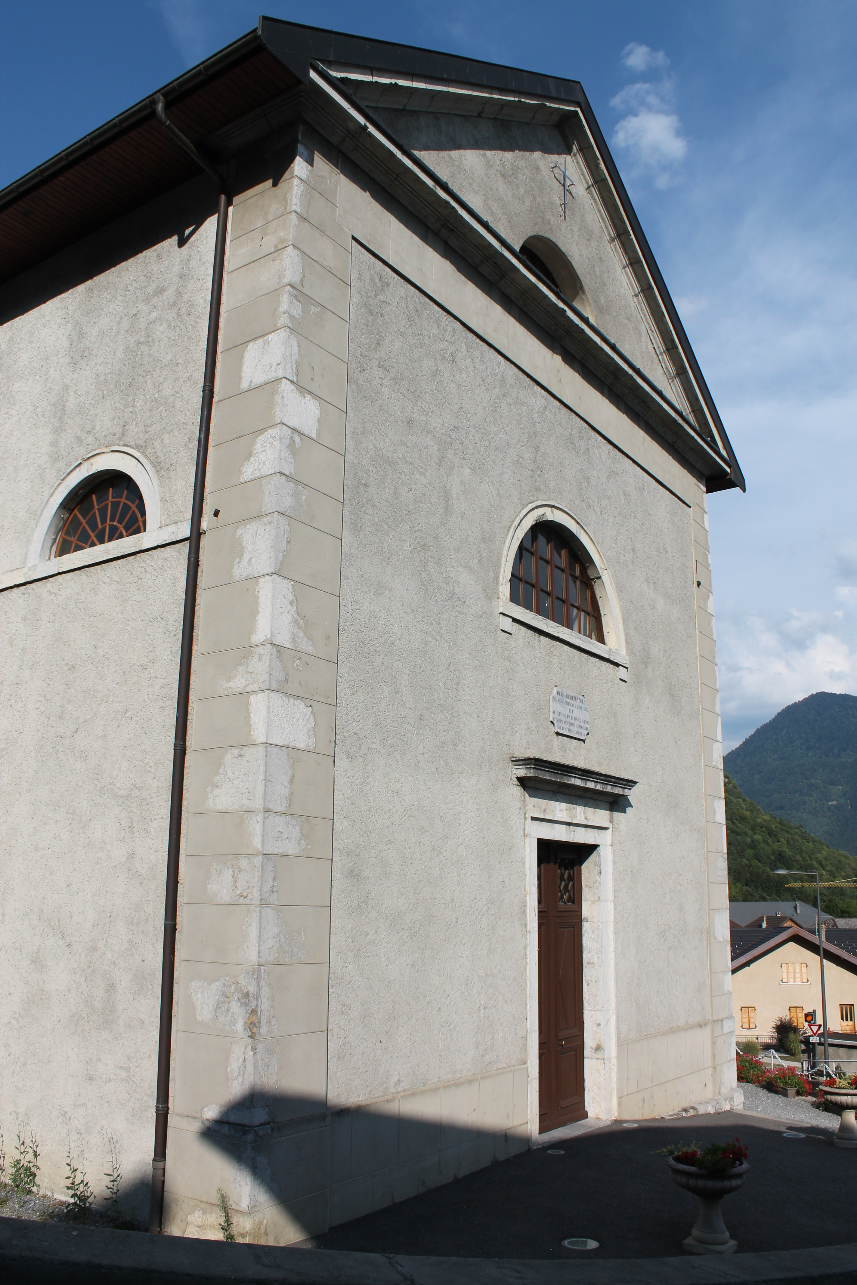 Façade de l'église Saint-Ferréol (août 2018).